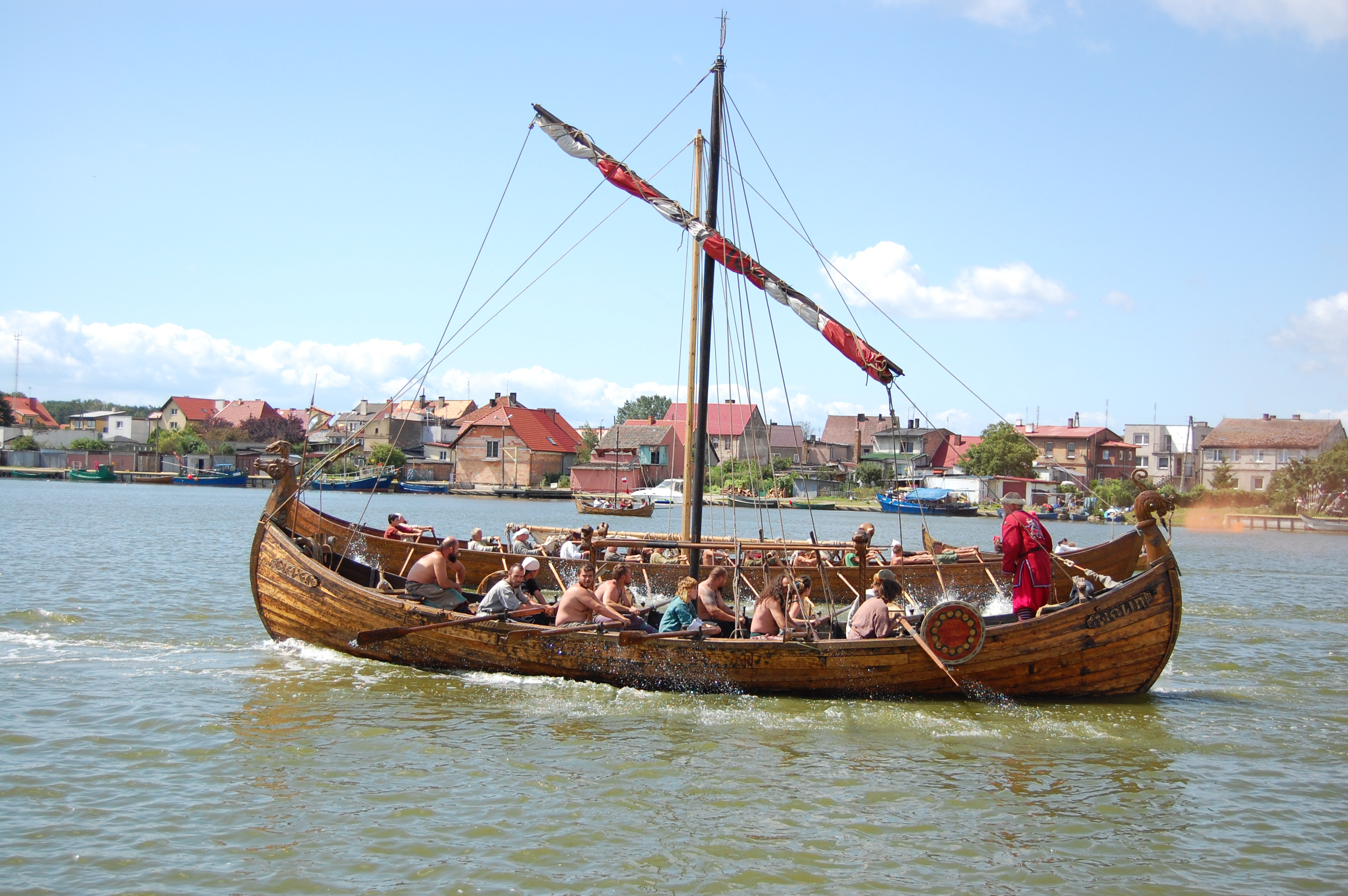 Festiwal Słowian i Wikingów w 2009 roku